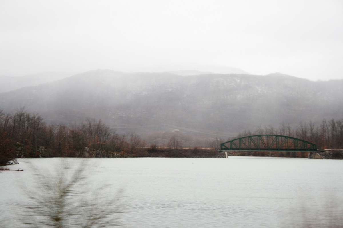 Zagreb_Split